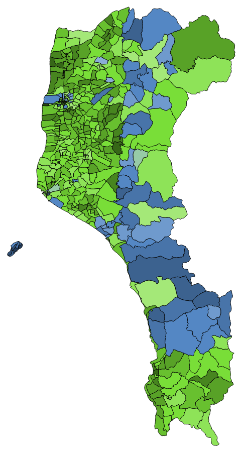 顏色對照表